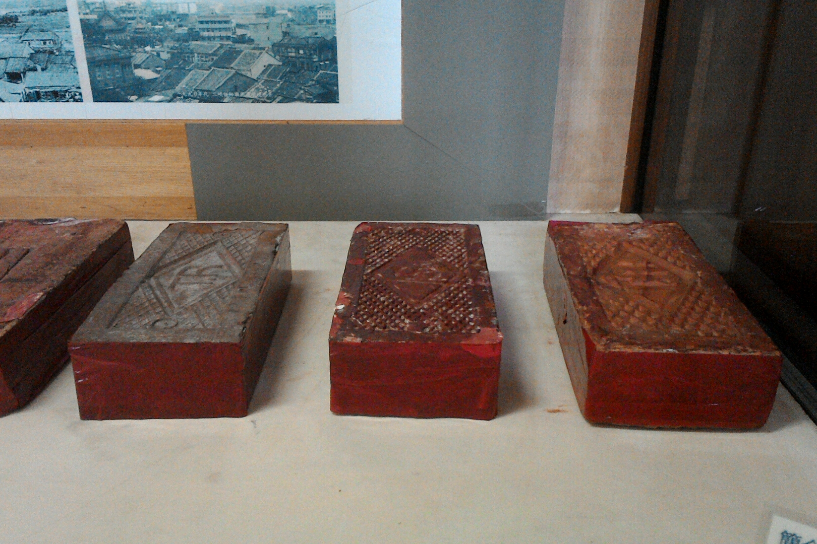 三峽區歷史文物館內展示的S磚與TR磚,新北市三峽區永館里